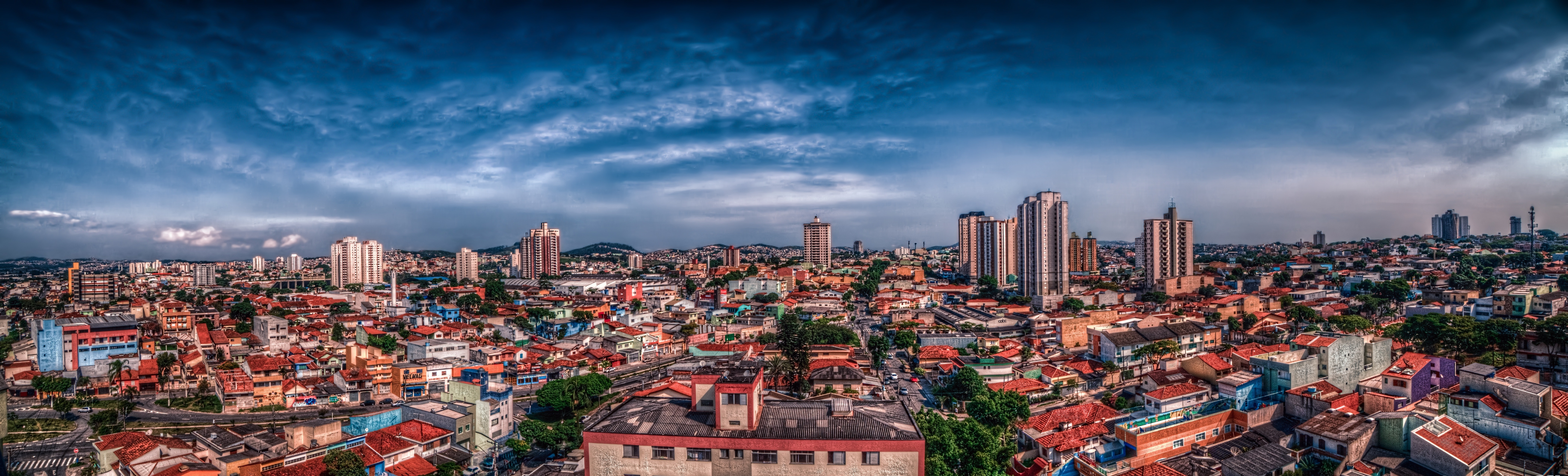 Santo André - SP